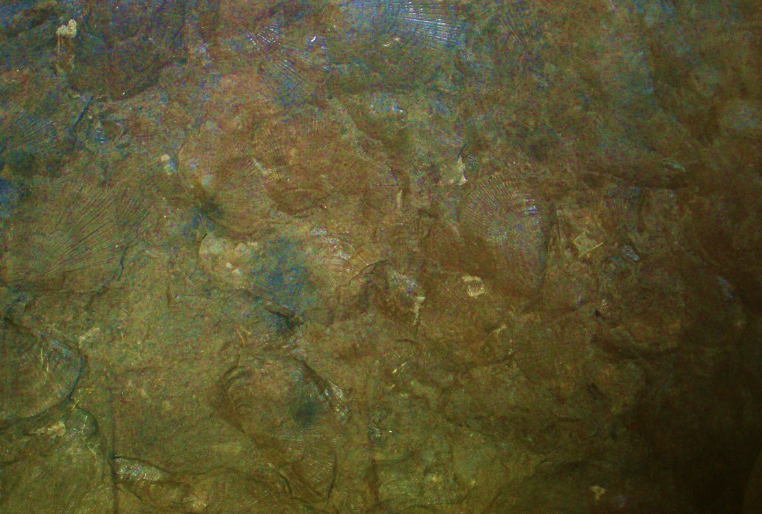 Fossil of Daonella, an extinct mollusc-- Took the photo at Museo dei Fossili di Besano